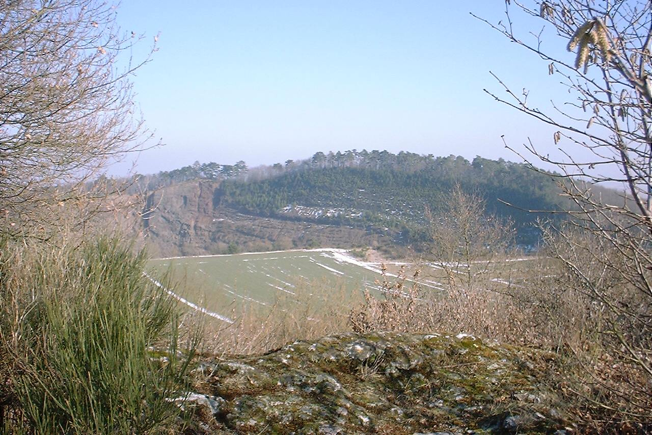 Blick vom Bellerberg zum gegenüber liegenden Büden bei Ettringen